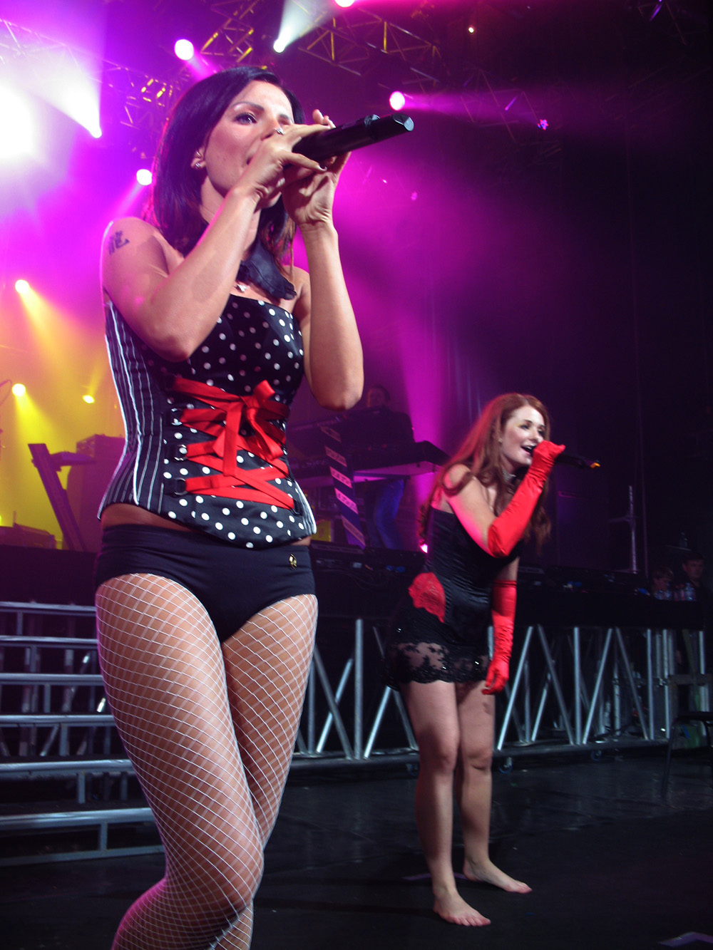 t.A.T.u. Bacardi B-LIVE in Moscow (Julia Volkova)